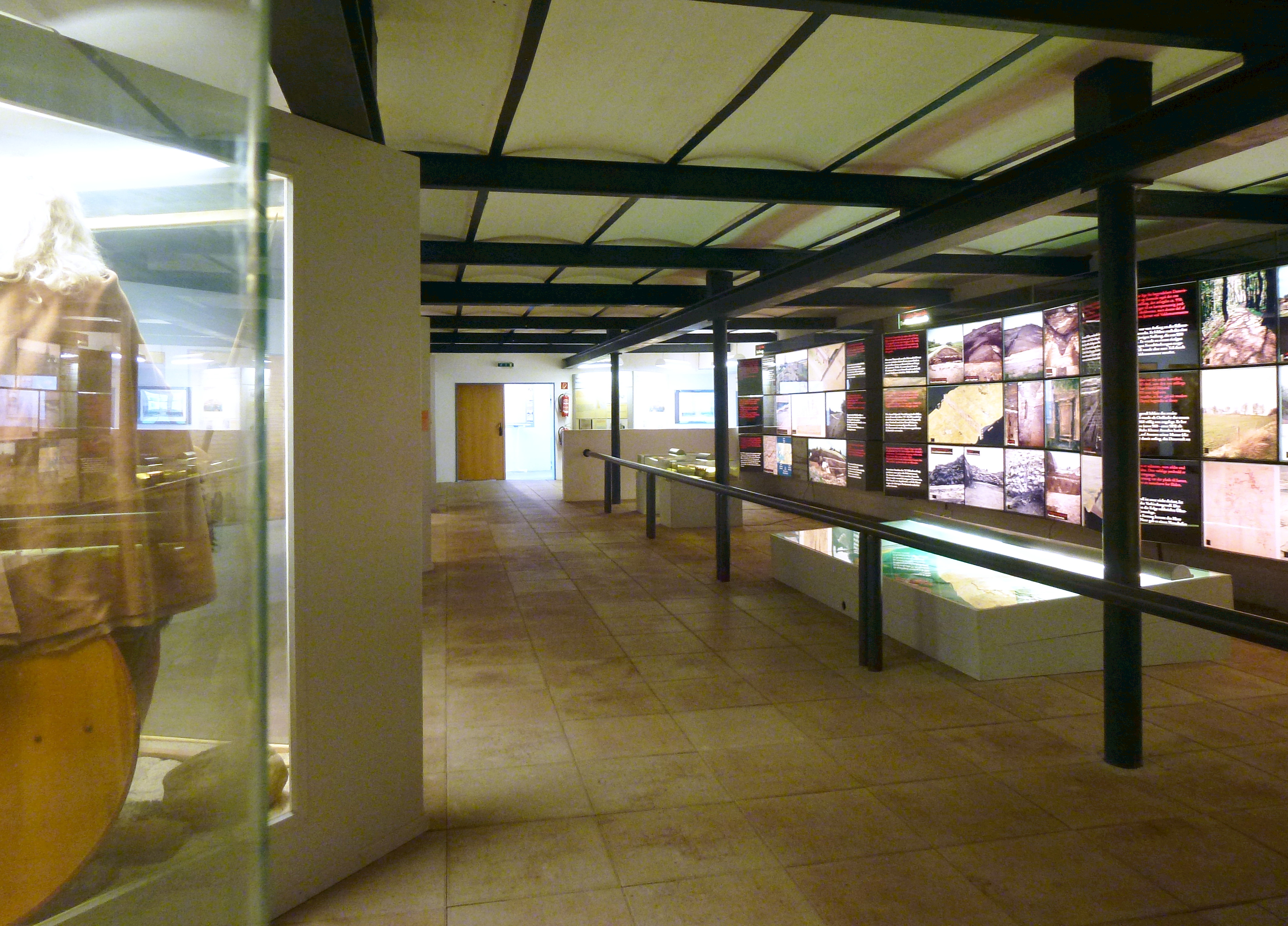 Danewerk Museum, Interiör